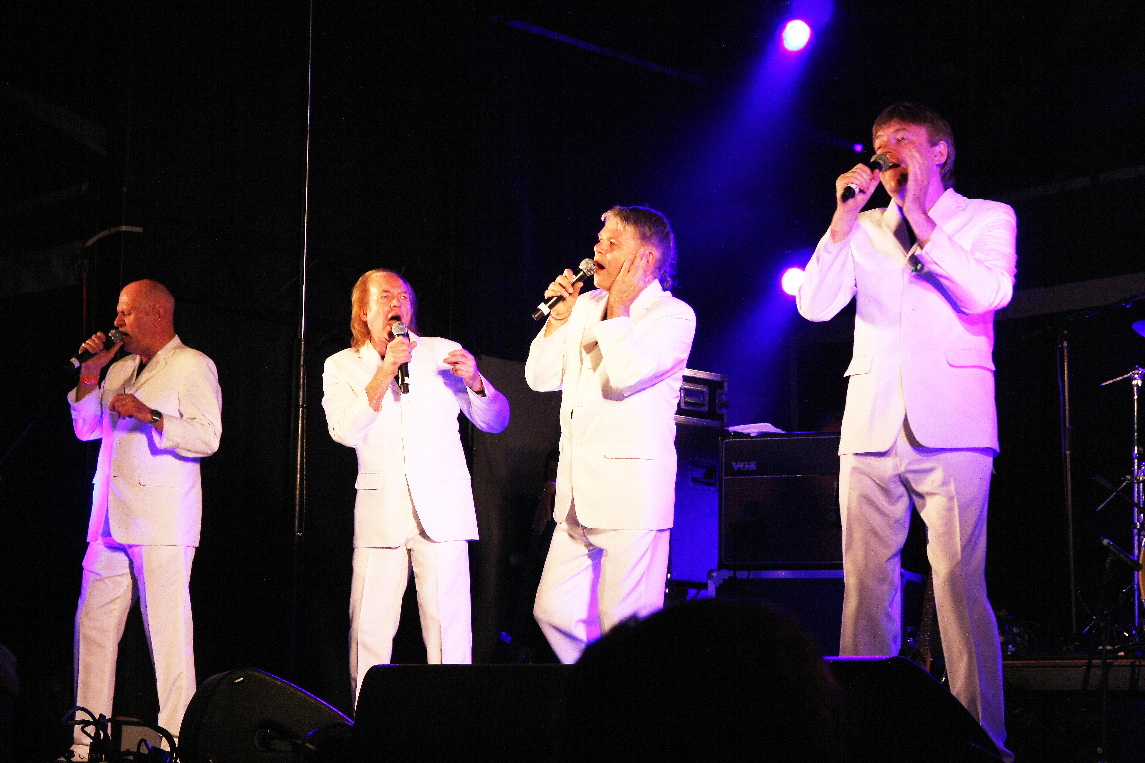 The Rubettes waren een Britse glamrock- annex teenybopper popgroep.